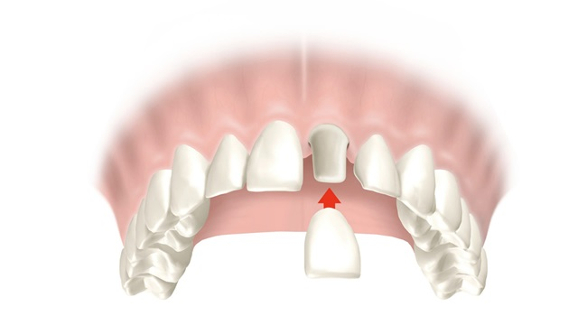 Corona dental